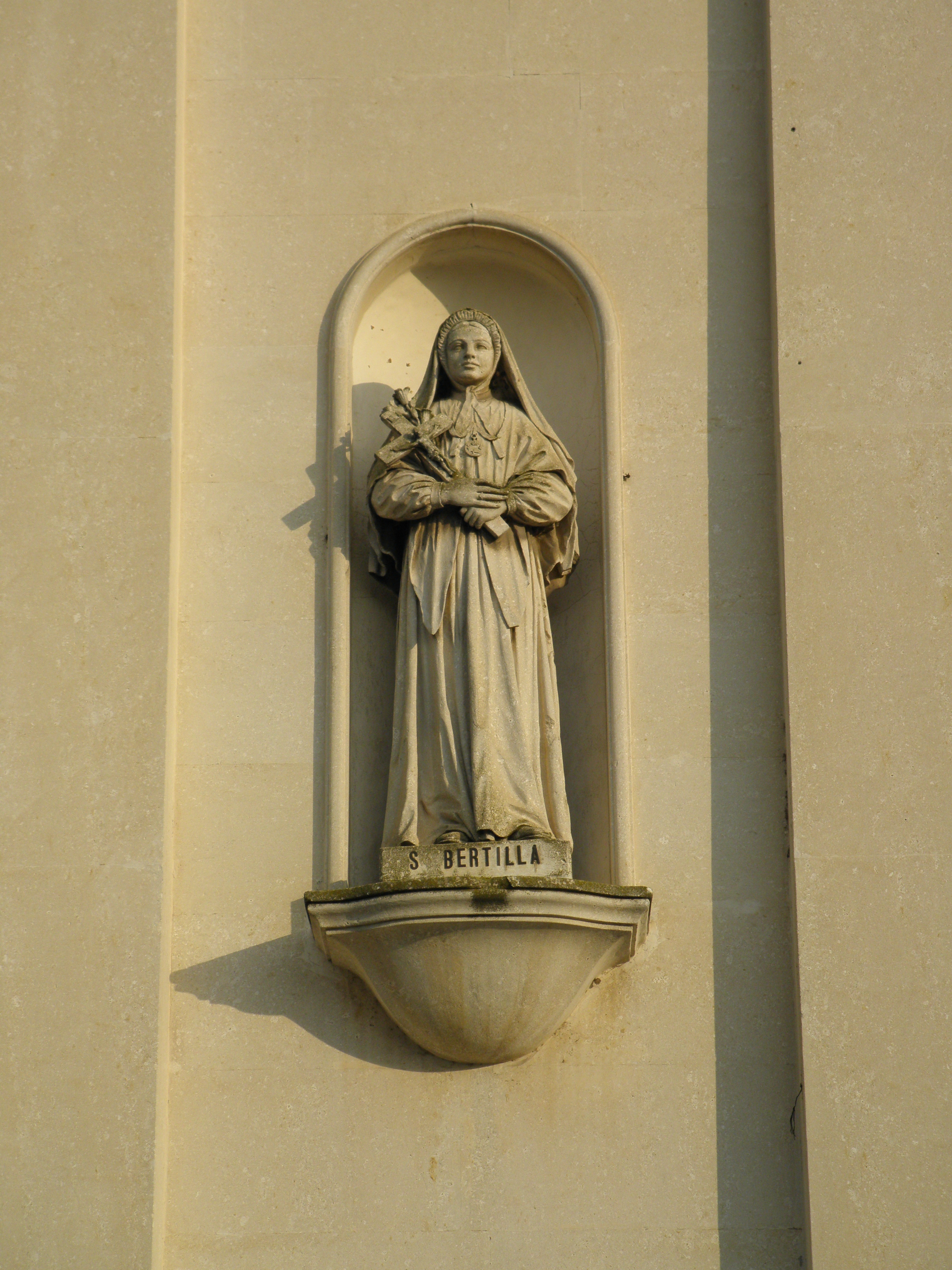 Cagnano, frazione di Pojana Maggiore: chiesa dei Santi Pietro e Paolo, la statua di Santa Bertilla che impreziosisce la facciata.